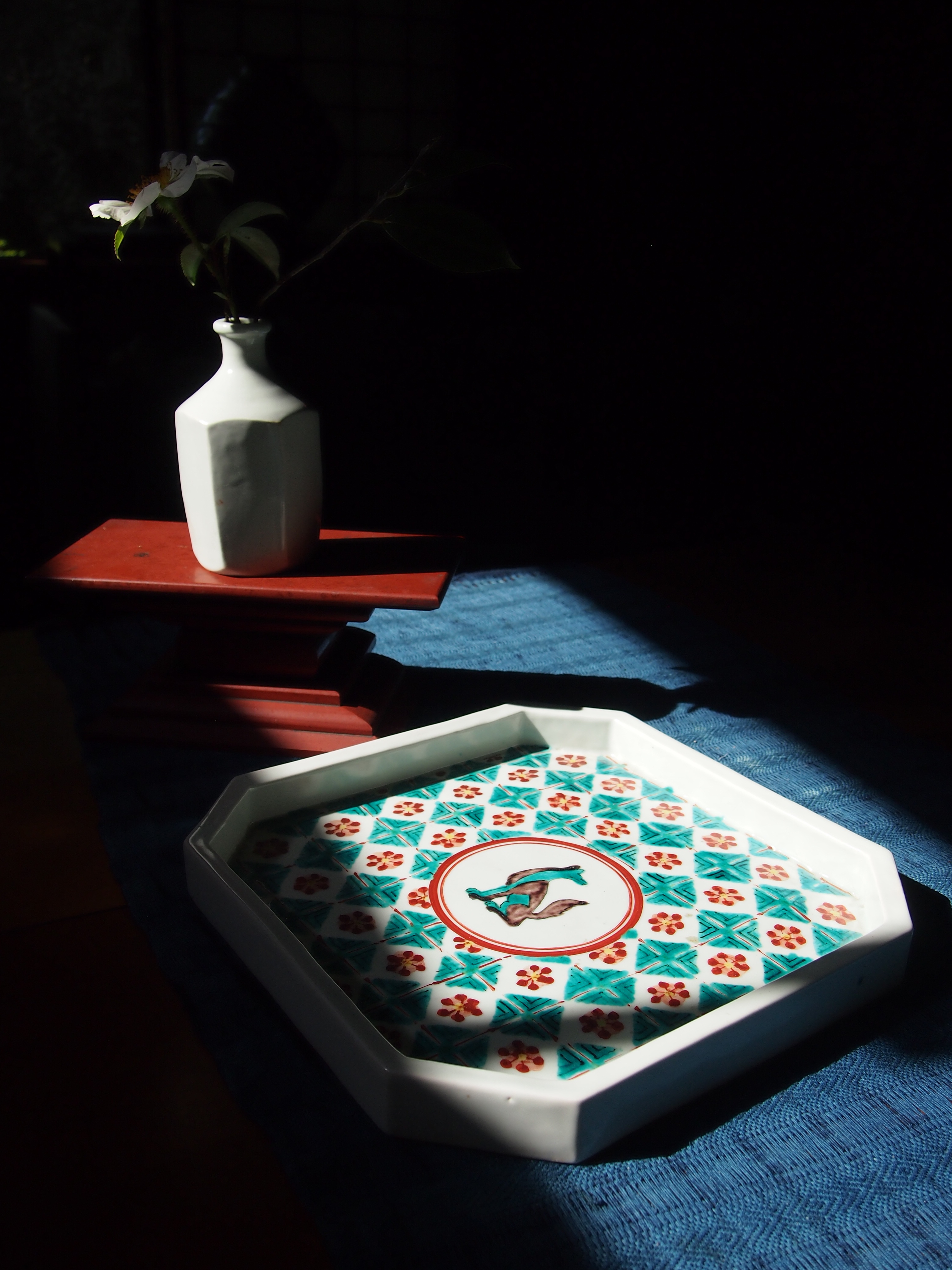 白磁